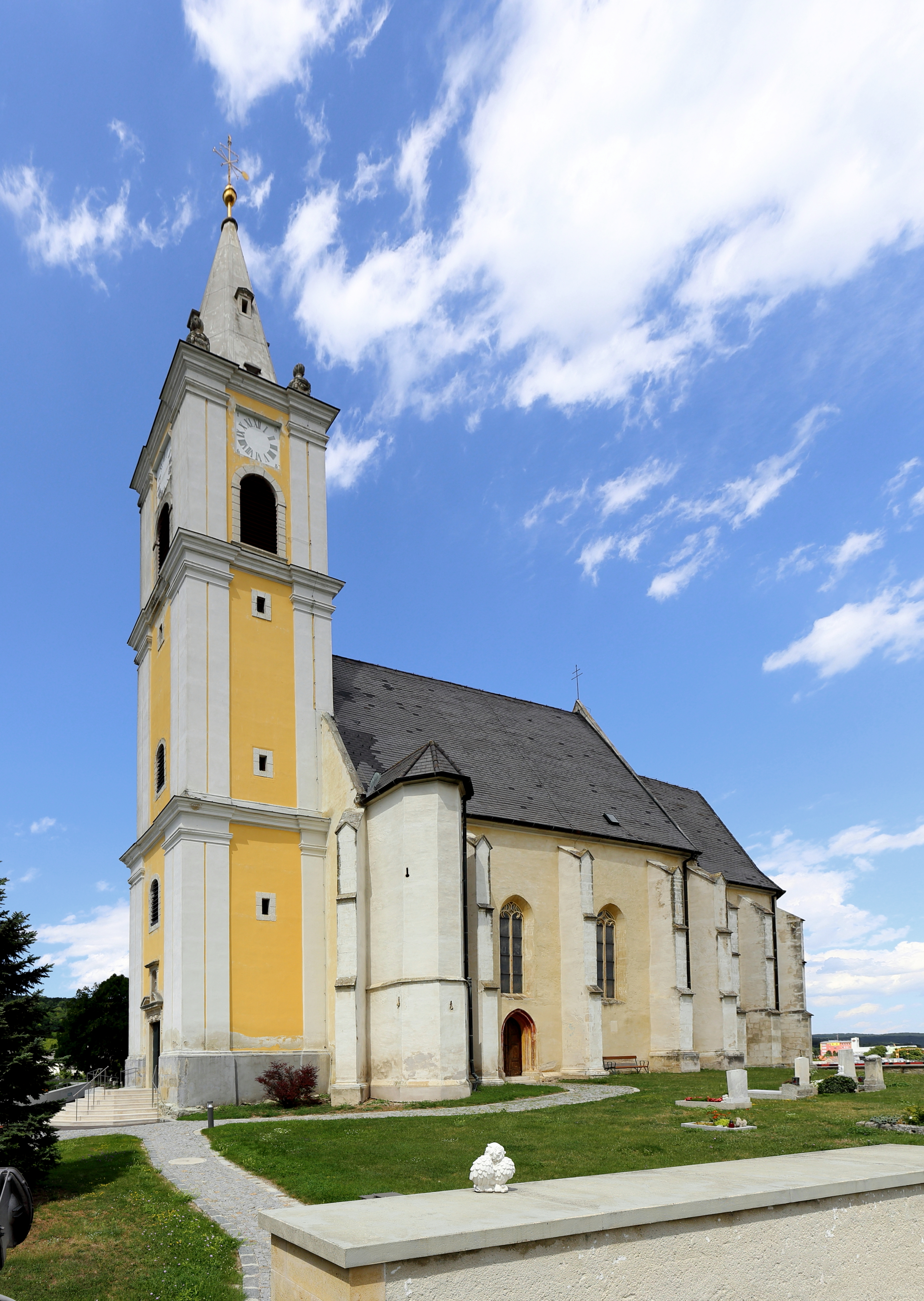 Südostansicht der röm.-kath. Pfarrkirche hl. Veit in Kleinhöflein, ein Ortsteil der burgenländischen Landeshauptstadt Eisenstadt.Die Kirche wurde auf einer Anhöhe errichtet, wobei der Chorraum aus dem 15. Jahrhundert stammt und das spätgotische Schiff 1528 angebaut wurde. Die Errichtung des dreigeschossigen Westturmes mit steinernem Spitzhelm erfolgte 1700.